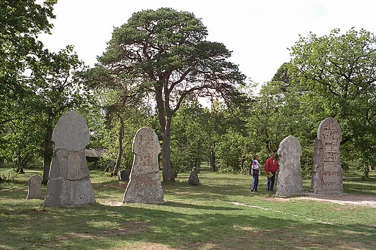 Motiv: Bildstenar i Bunge friluftsmuseum Kategori: Bildristning .